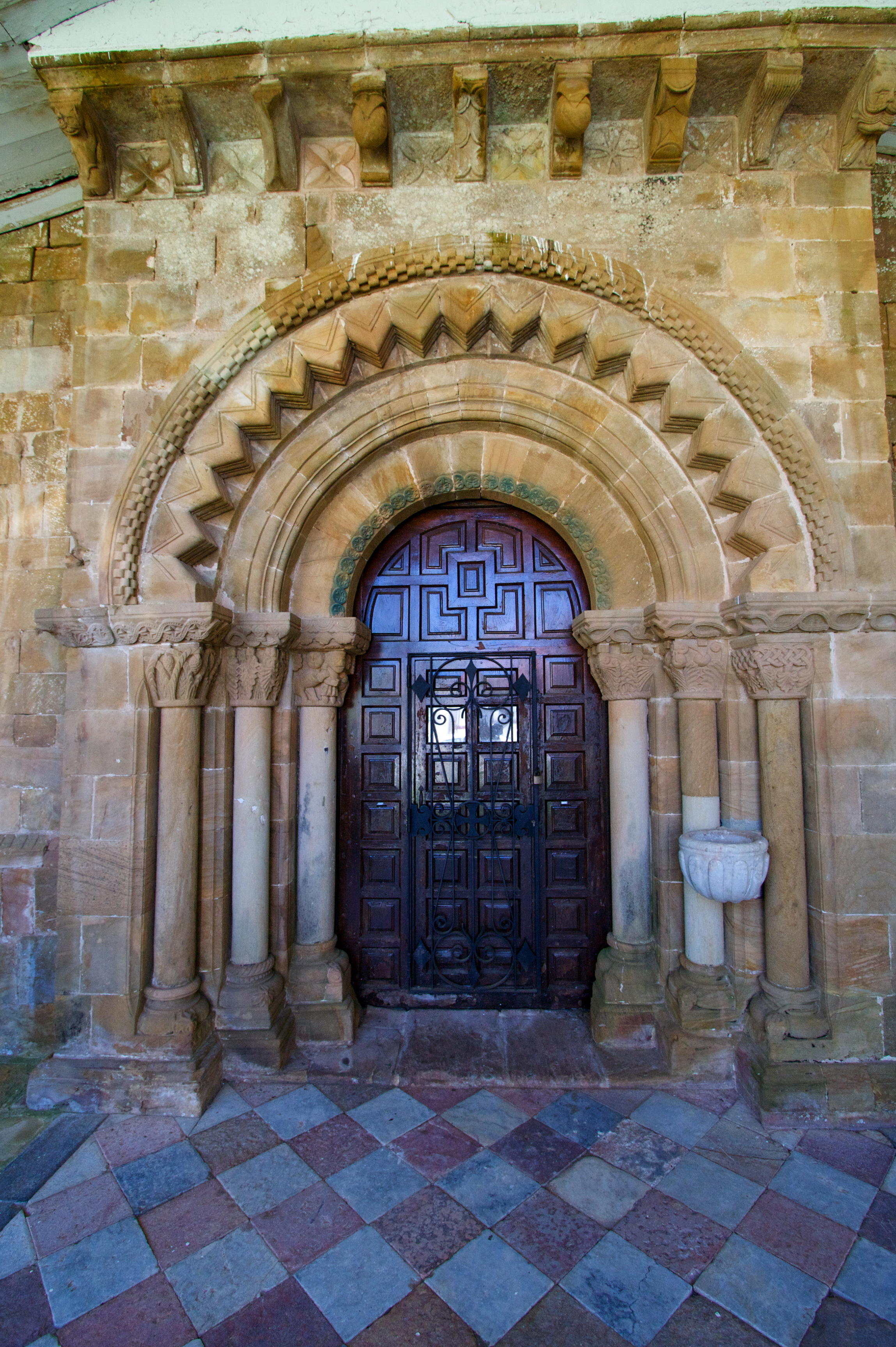 Puerta principal de la iglesia de Santa María de Llugás, Villaviciosa, Asturias.